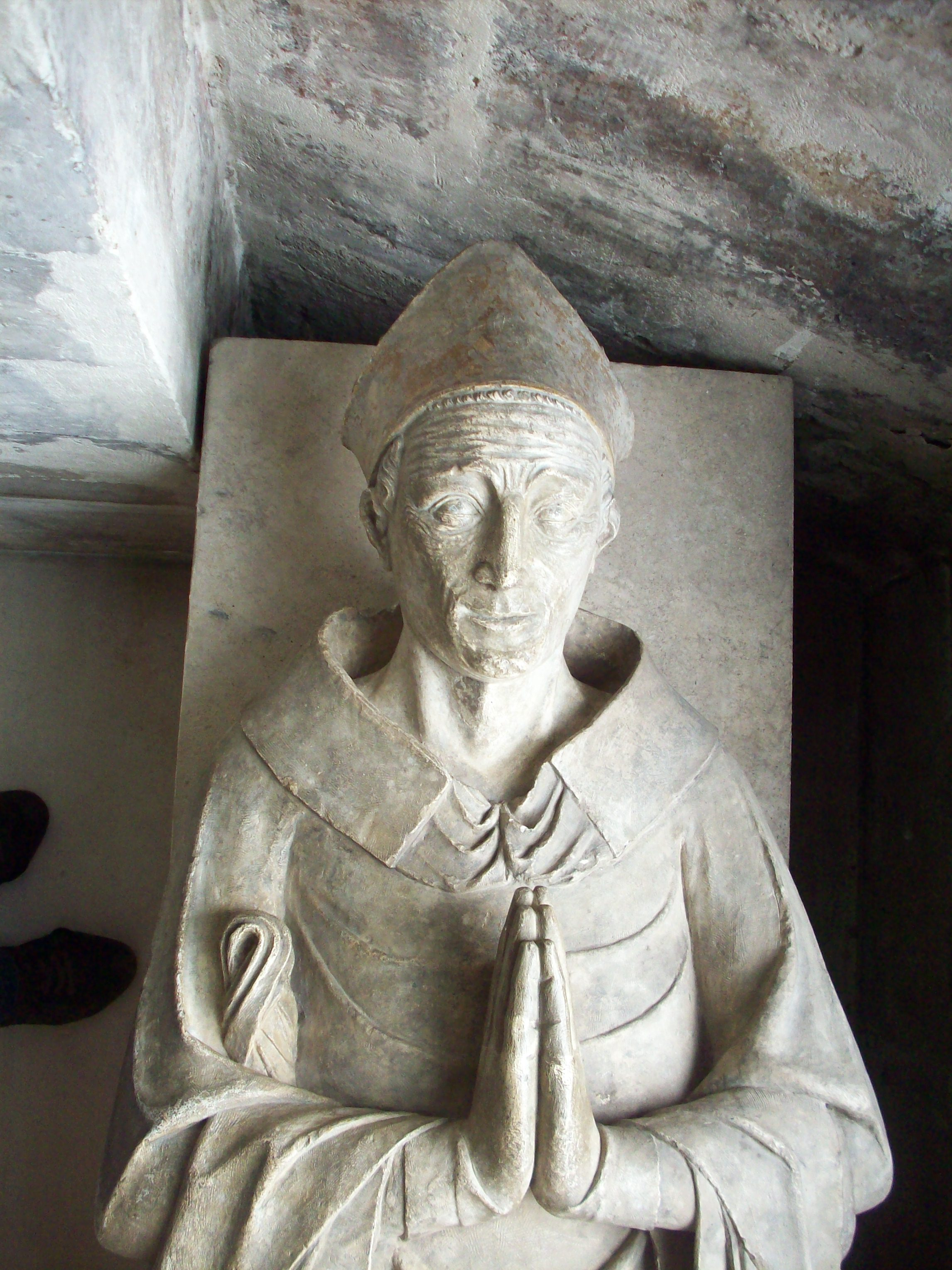 Détail du gisant de Geoffroy Fae, abbé du Bec et évêque d'Évreux.